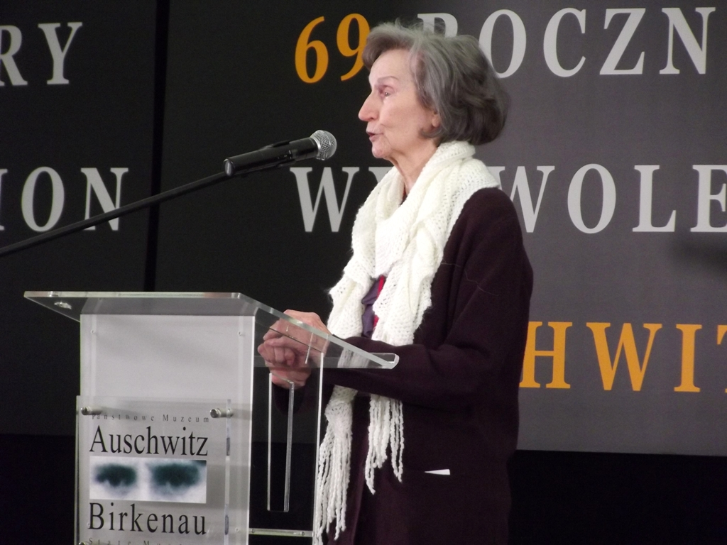 Zdjęcie zrobione podczas 69. rocznicy wyzwolenia KL Auschwitz-Birkenau.